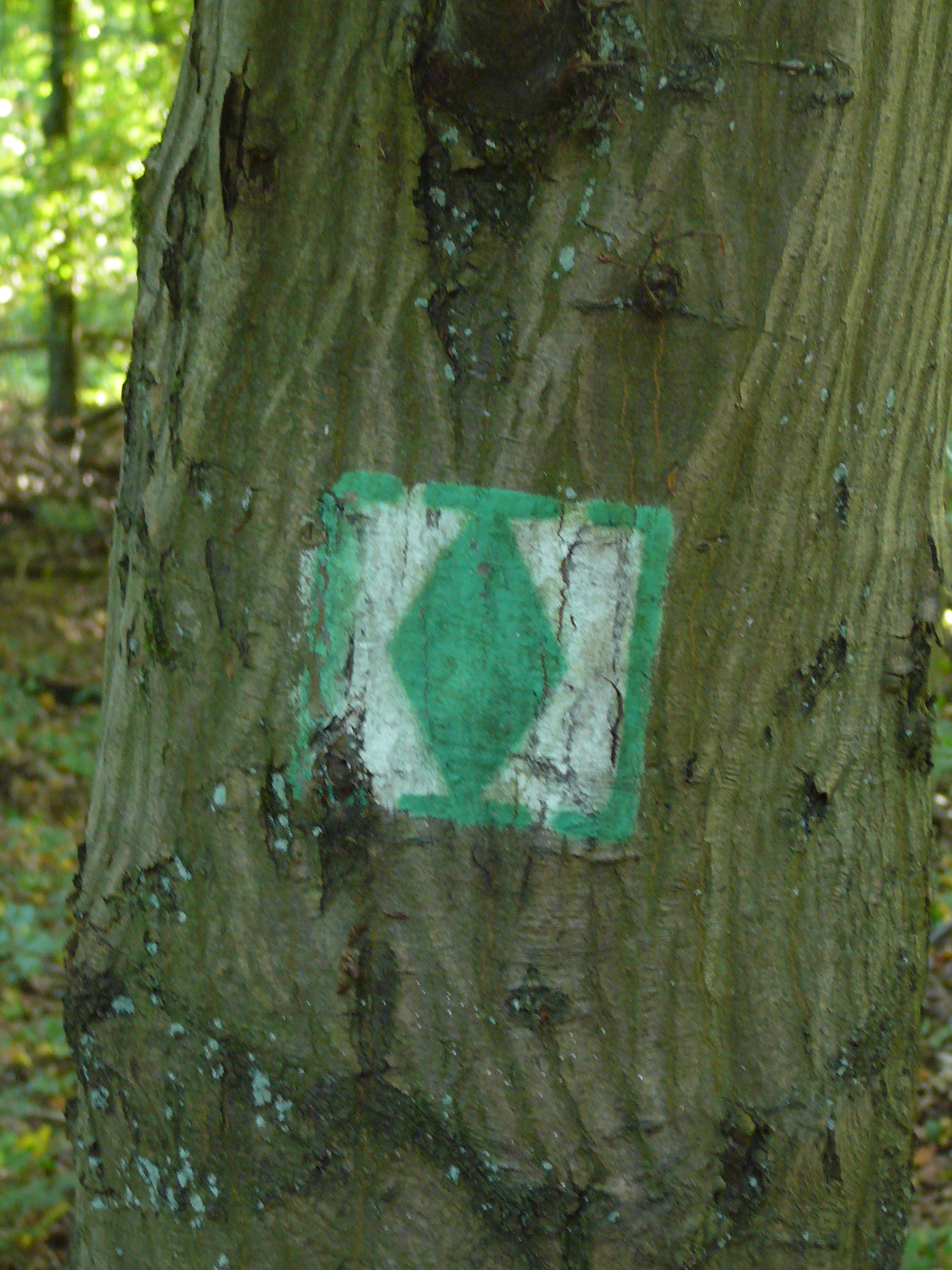 Wegemarkierung zum Brennenden Berg, vom Umsetzer ausgehend